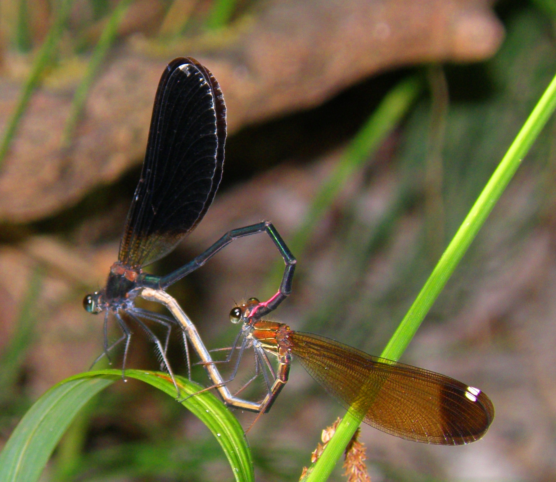 Damigella Calopteryx_Haemorrhoidalis (Van der Linden,1825) - Rio di Popogna, Livorno - Italy - Foto scattata il 31 Luglio 2008 da Stefano Baldacci